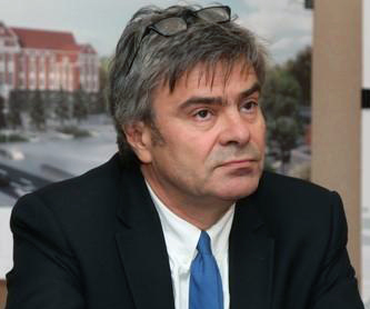 Włodzimierz Mucha - polski architekt, współzałożyciel pracowni Bulanda i Mucha Architekci. Olsztyn, 2013